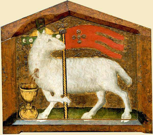 agnus dei // Beránek Boží Karlštejn – Kaple Svatého Kříže kolem r. 1365